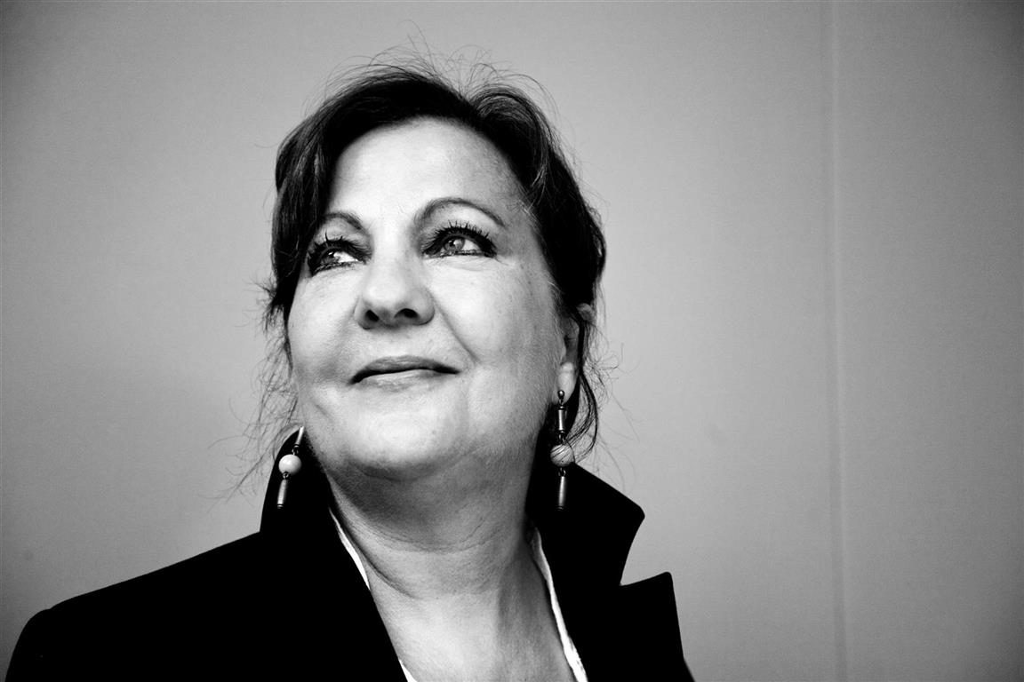 Portada disco "Raíces y Alas"